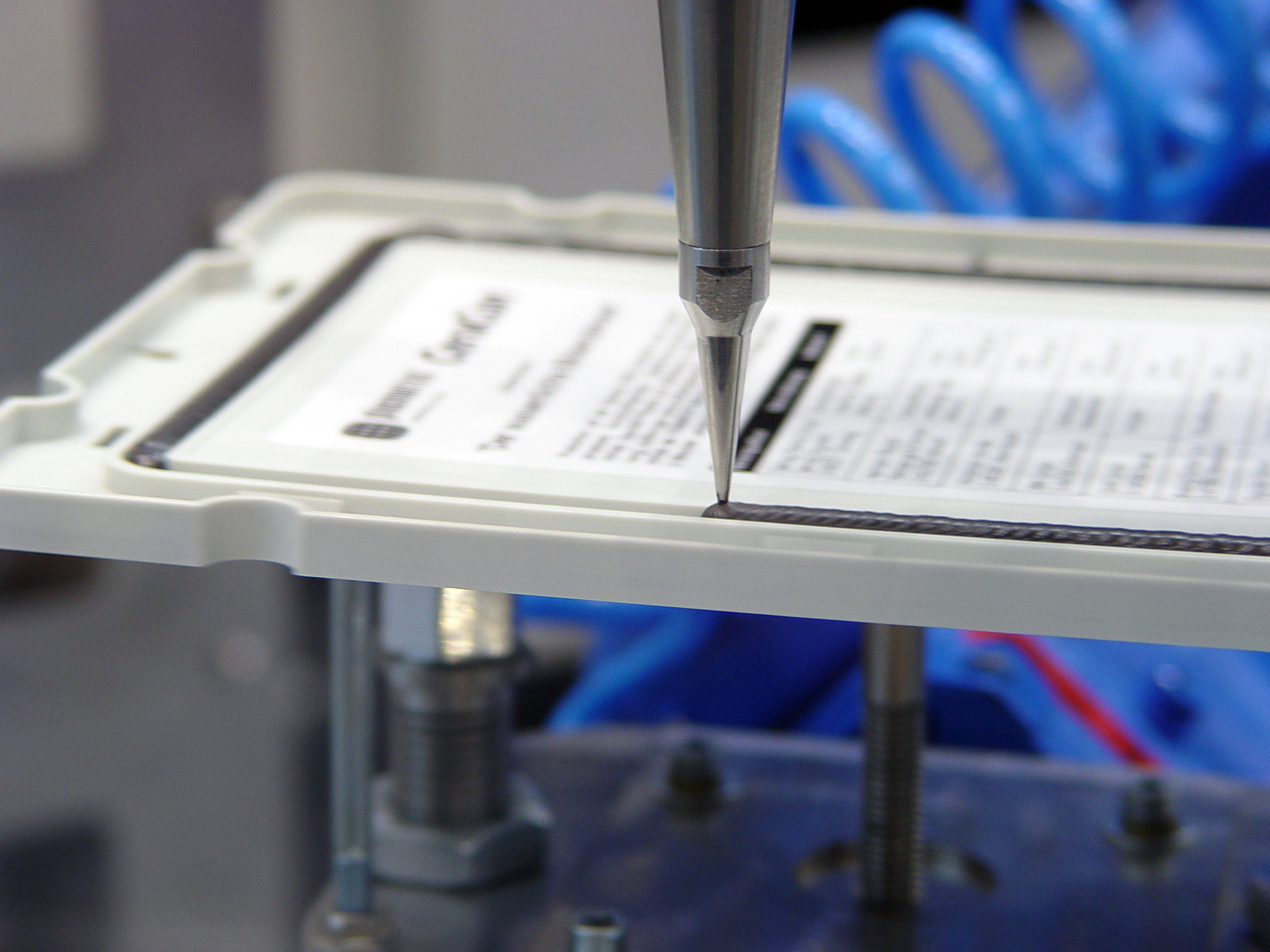 Dichtungsauftrag per FIPFG